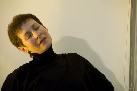 דינה בליי-שור השולחן עבודת כיתה צילום אלדד מאסטרו